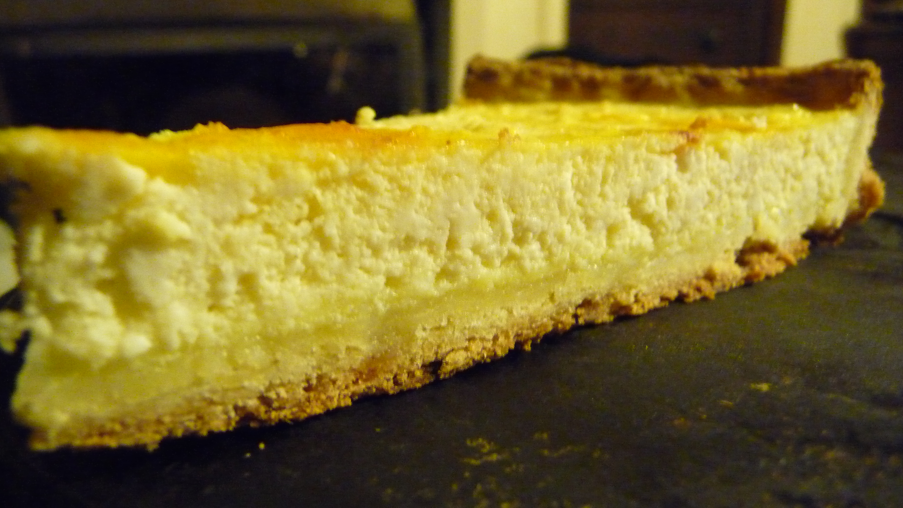 Flauna del Roergue miegjornal (fleo de la recuècha de fèda)